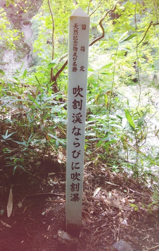 吹割の滝前で撮影。